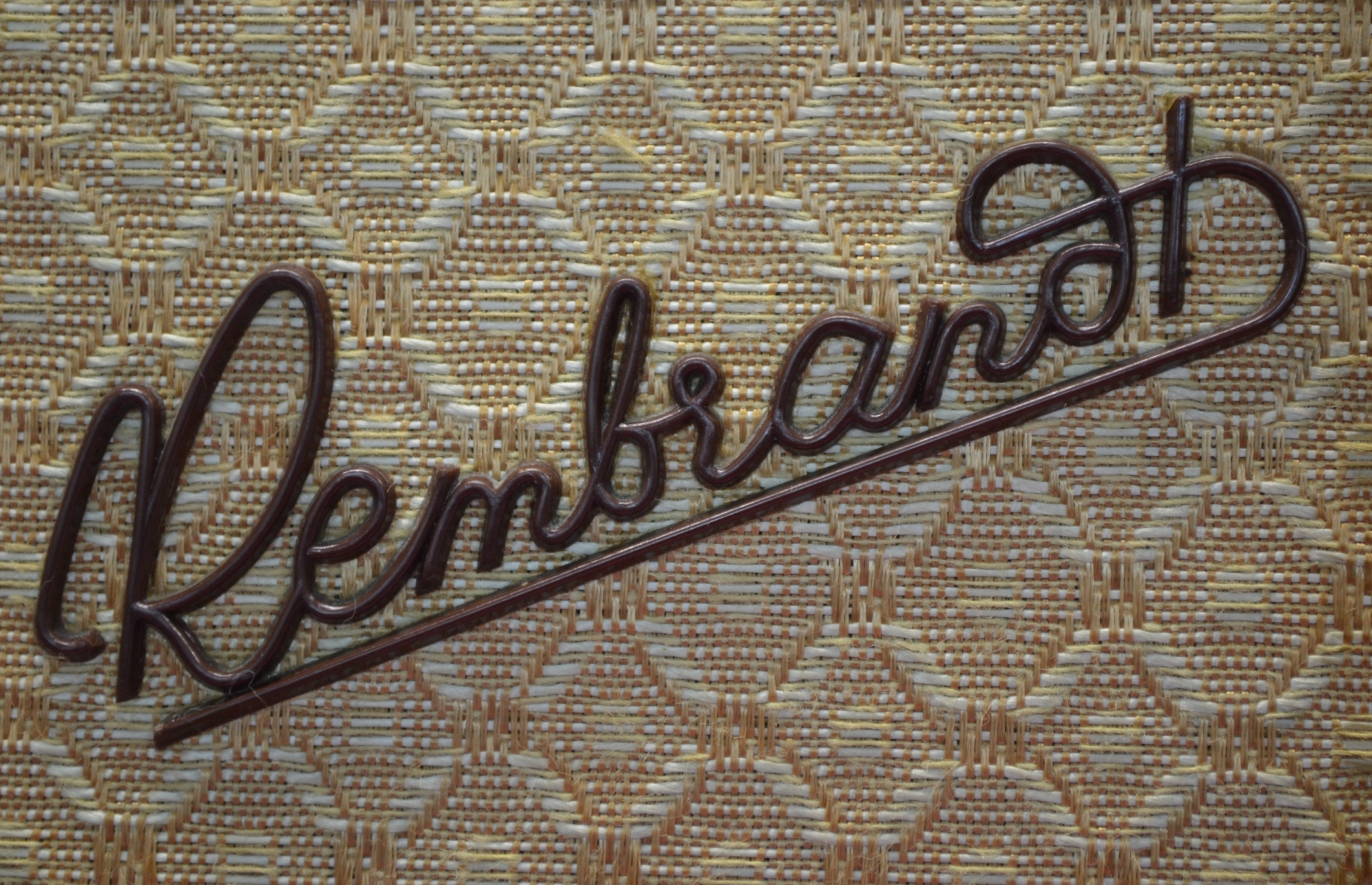 Schriftzug des Fernsehgeräts FE 852 Rembrandt aus DDR-Produktion.